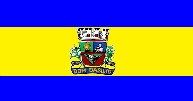 Bandeira do Município de Dom Basílio